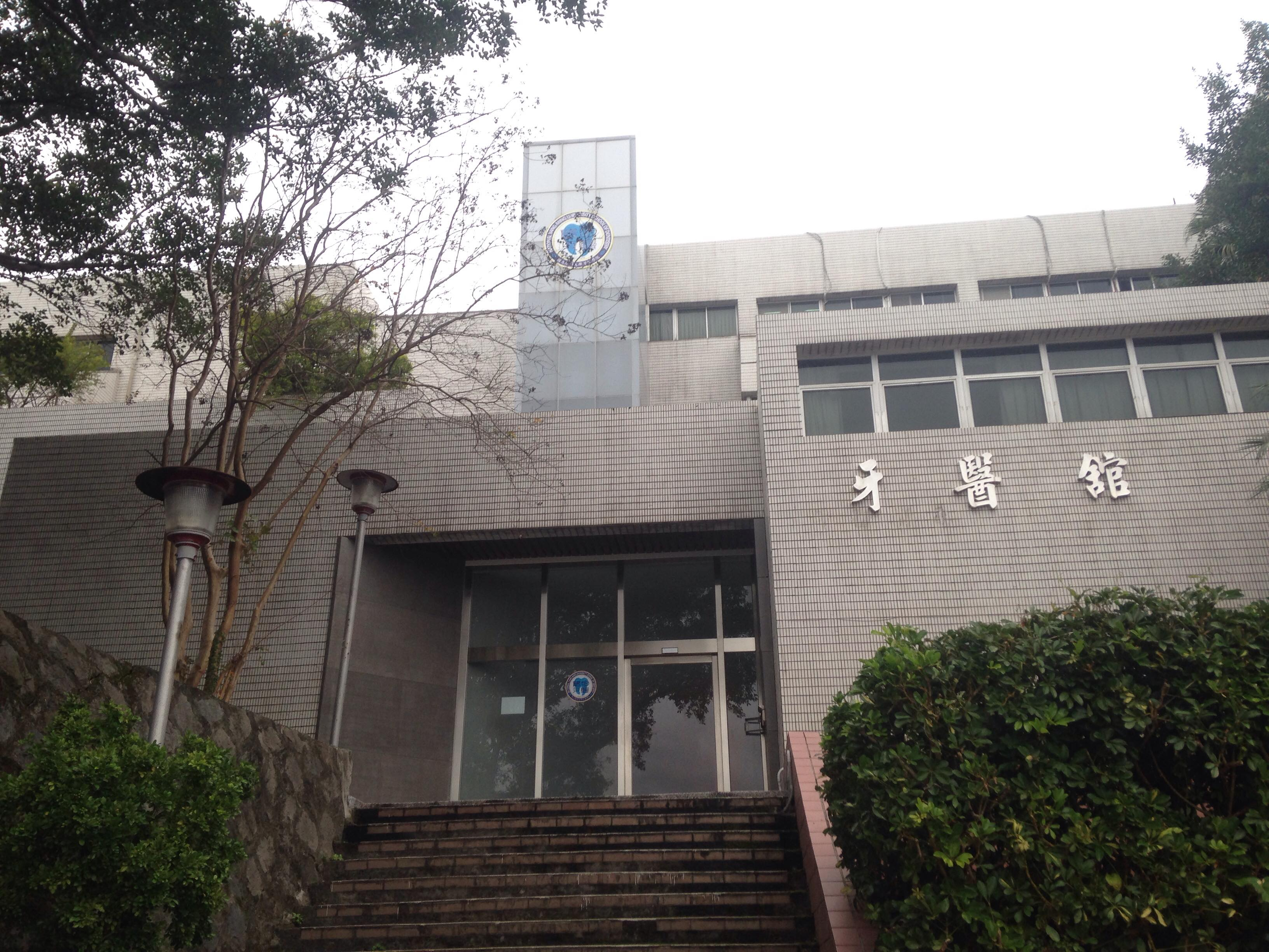 國立陽明大學牙醫館